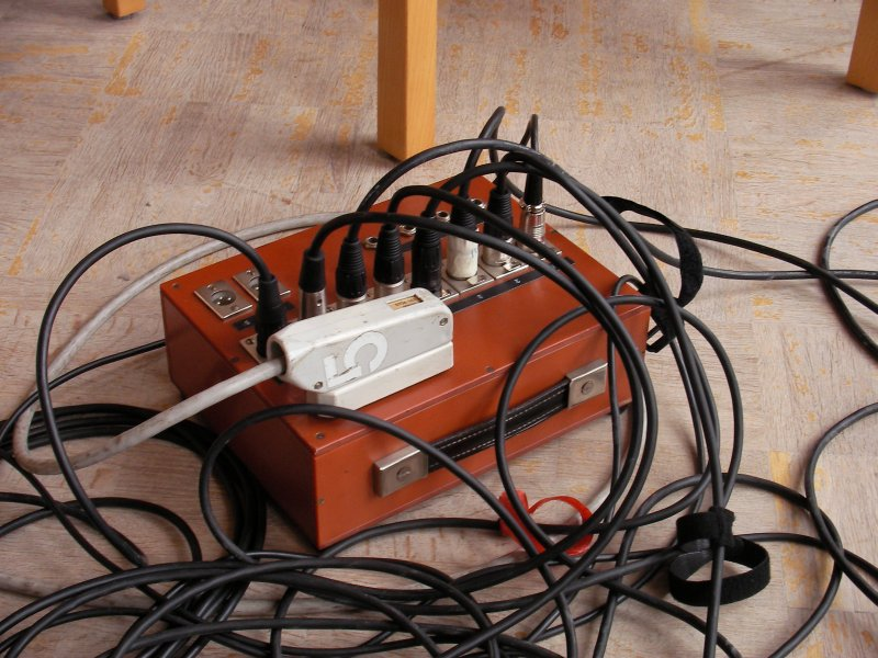 Multicore